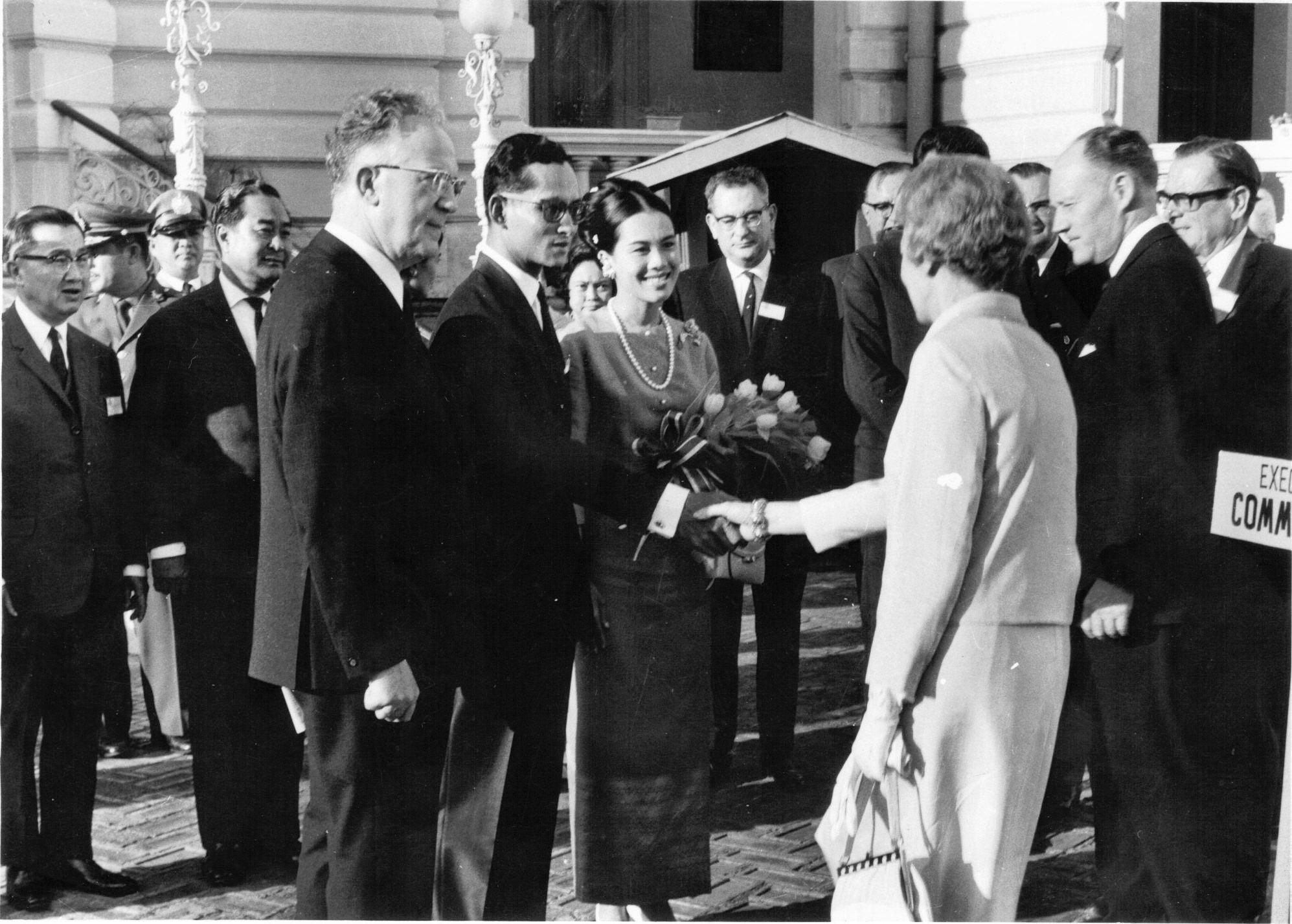 בכנס ראשי ערים של ארגון יול"ה בבנגקוק. יצחק כץ ייצג את מדינת ישראל. בתמונה: בפגישה עם מלך ומלכת תאילנד